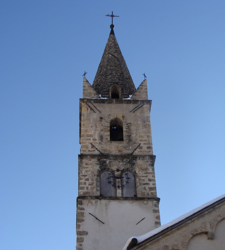 Le clocher de l'église de Crots (Hautes-Alpes)